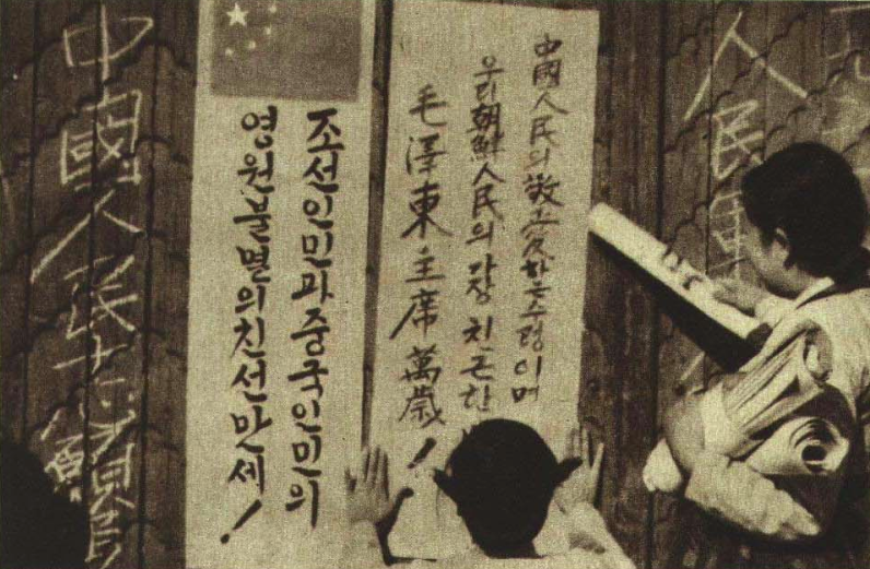 195103 1950年朝鲜战争中国志愿军攻入汉城